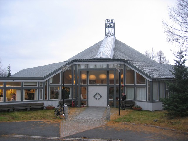 Grønnåsen kirke i Tromsø